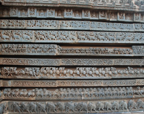 ಕನ್ನಡ: ಪಟ್ಟಿಕೆಗಳ ರಚನೆ